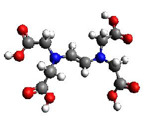 EDTA molekuli pilt programmiga Avogadro